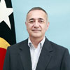 Alfredo Pires